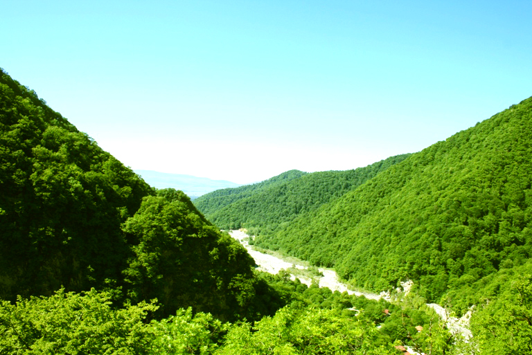 Ismailli, Azerbaijan